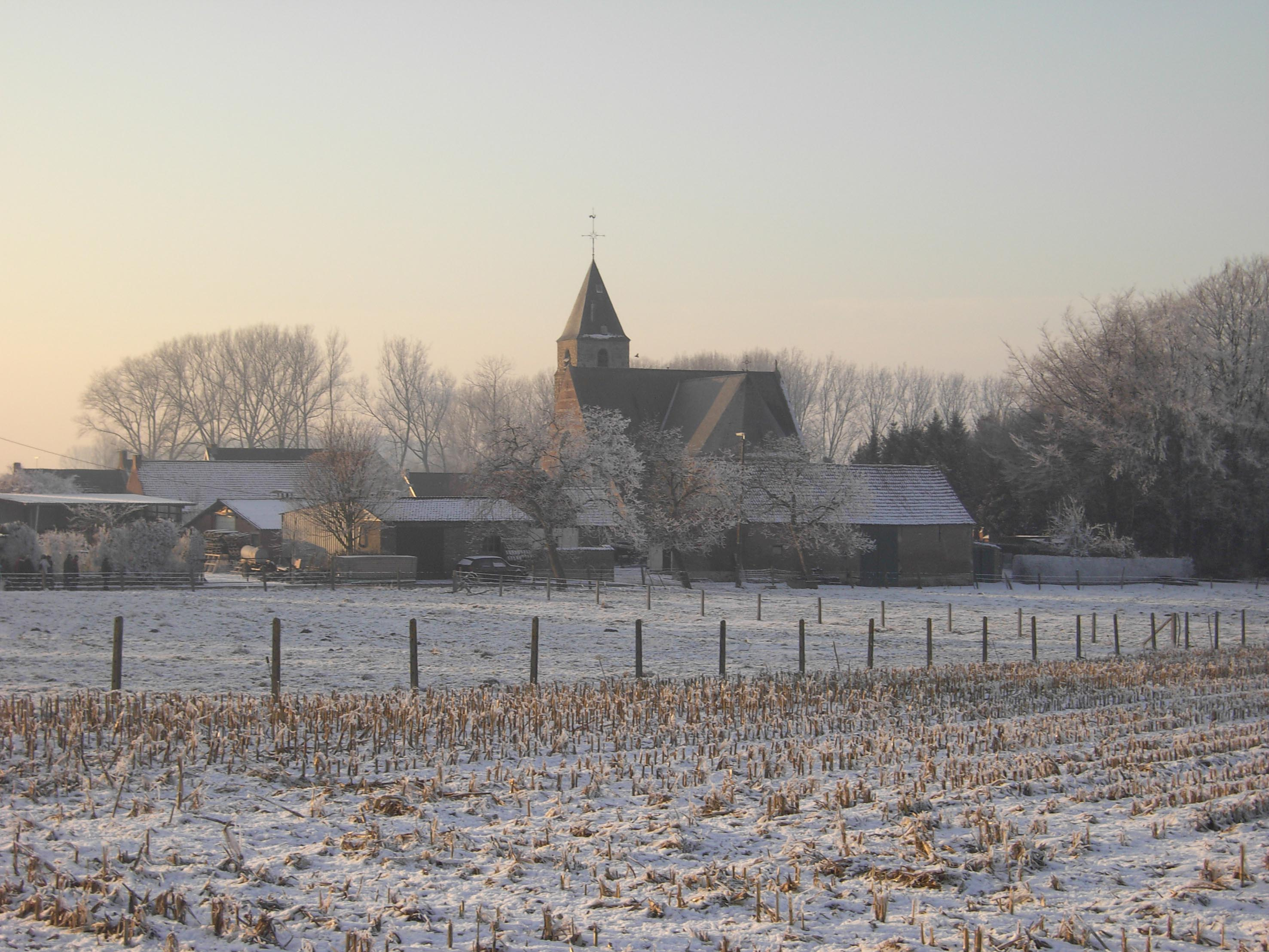 Kerk van Oombergen op 10 januari 2009 - Zottegem - Oost-Vlaanderen - Vlaanderen - België